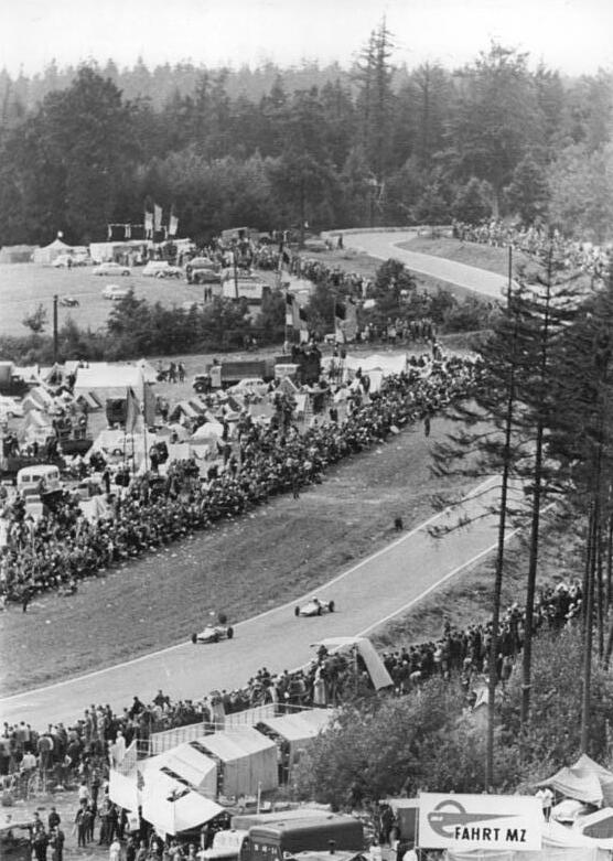 Zentralbild Kohls 23.8.1963 Sachsenring-Kurs veränderte sein Gesicht Als ein würdiger Gastgeber für die Besten des internationalen Motorennsports aus 22 Nationen erwies sich am Wochenende wiederum der im Süden der DDR bei Hohenstein-Ernstthal gelegene Sachsenring-Kurs. Im jahre 1949 wurde nach zehnjähriger Pause wieder an die große Tradition der Sachsenring-Rennen angeknüpft. Mit großzügiger Unterstützung der Arbeiter- und Bauernmacht wurde der Kurs weiter ausgebaut. Allein 1961 wurden zehntausende DM zur Verbesserung der Stecke verwandt. So erhielten damals zwei Drittel des Kurses einen neuen Rauhbelag, der hitzebeständiger und ebenflächiger ist. Auch die Kurve am Queckenberg bei Start und Ziel wurde begradigt und um drei Meter verbreitert. Durch die umfangreichen Bauarbeiten ist der Sachsenring-Kurs nicht nur sicherer, sondern auch erheblich schneller geworden. Die populäre Motorsportveranstaltung auf den Sachsenring fördert wie kaum ein anderes internationales Rennen die freundschaftlichen Beziehungen untereinander, nicht zuletzt auch deshalb, weil es hier keinerlei Diskriminierung gibt und alle Motorsportler, ganz gleich aus welchem Land sie kommen, herzlich willkommen sind. UBz: Blick auf die Abfahrt zwischen Jugendkurve und Queckenbergkurve. - Allein 1961 wurden rund 51 000 Quadratmeter Straßenfläche der Rennstrecke bearbeitet.